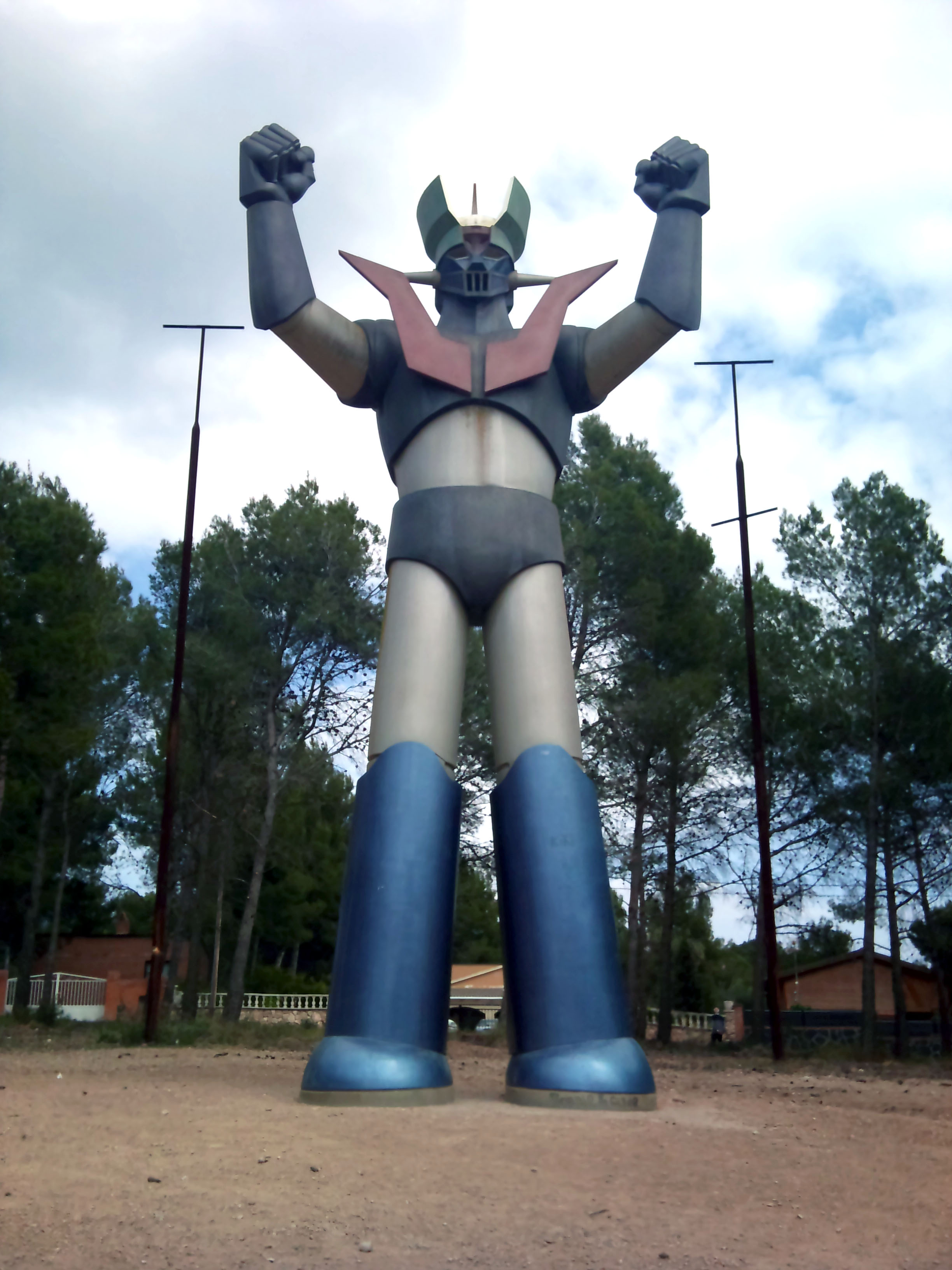 Escultura de Mazinger Z en la urbanización Mas del Plata, Cabra del camp Tarragona